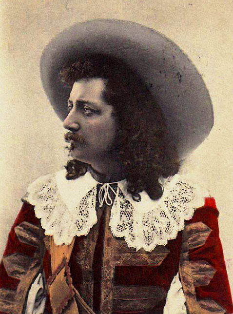 Tore Svennberg i De tre musketörerna